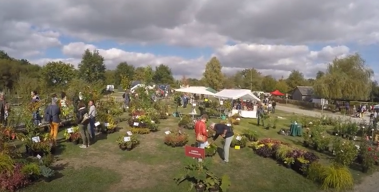 Art et jardin, réuni de nombreux visiteurs